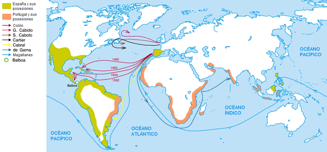 Era de los descubrimientos